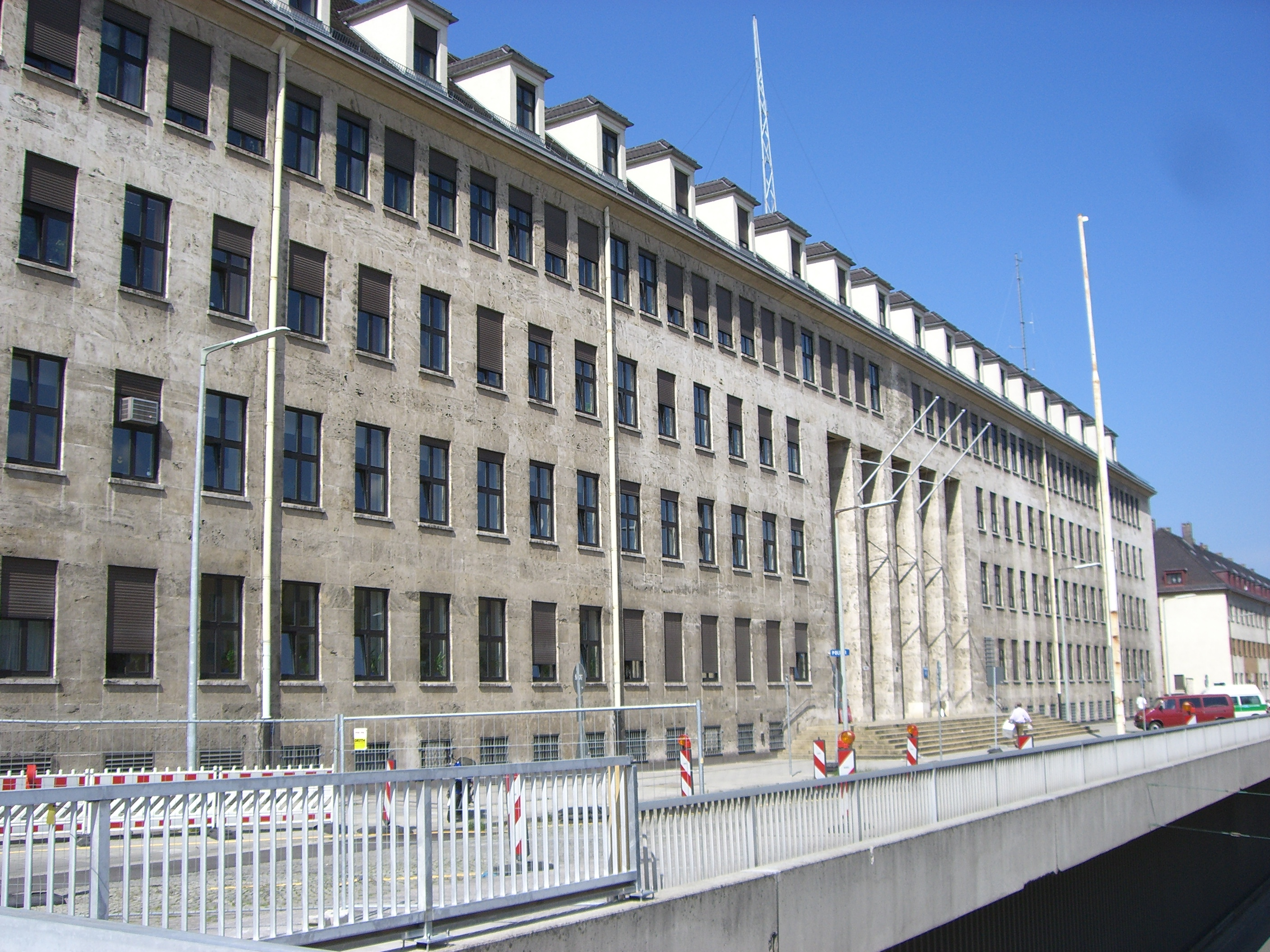 München - ehem. McGraw-Kaserne - Polizeirevier.jpg